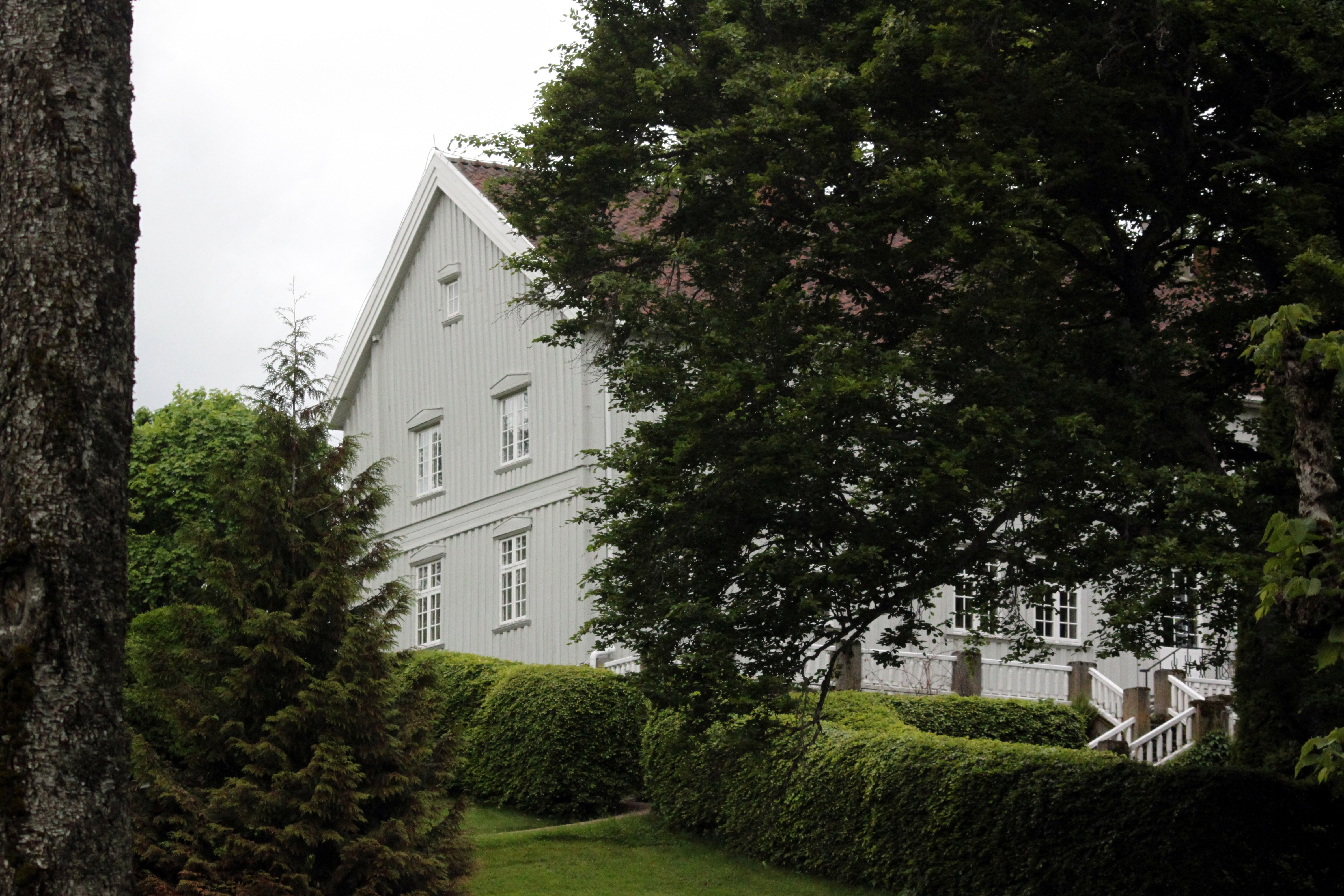 Ekeberg gård (Enebakk)